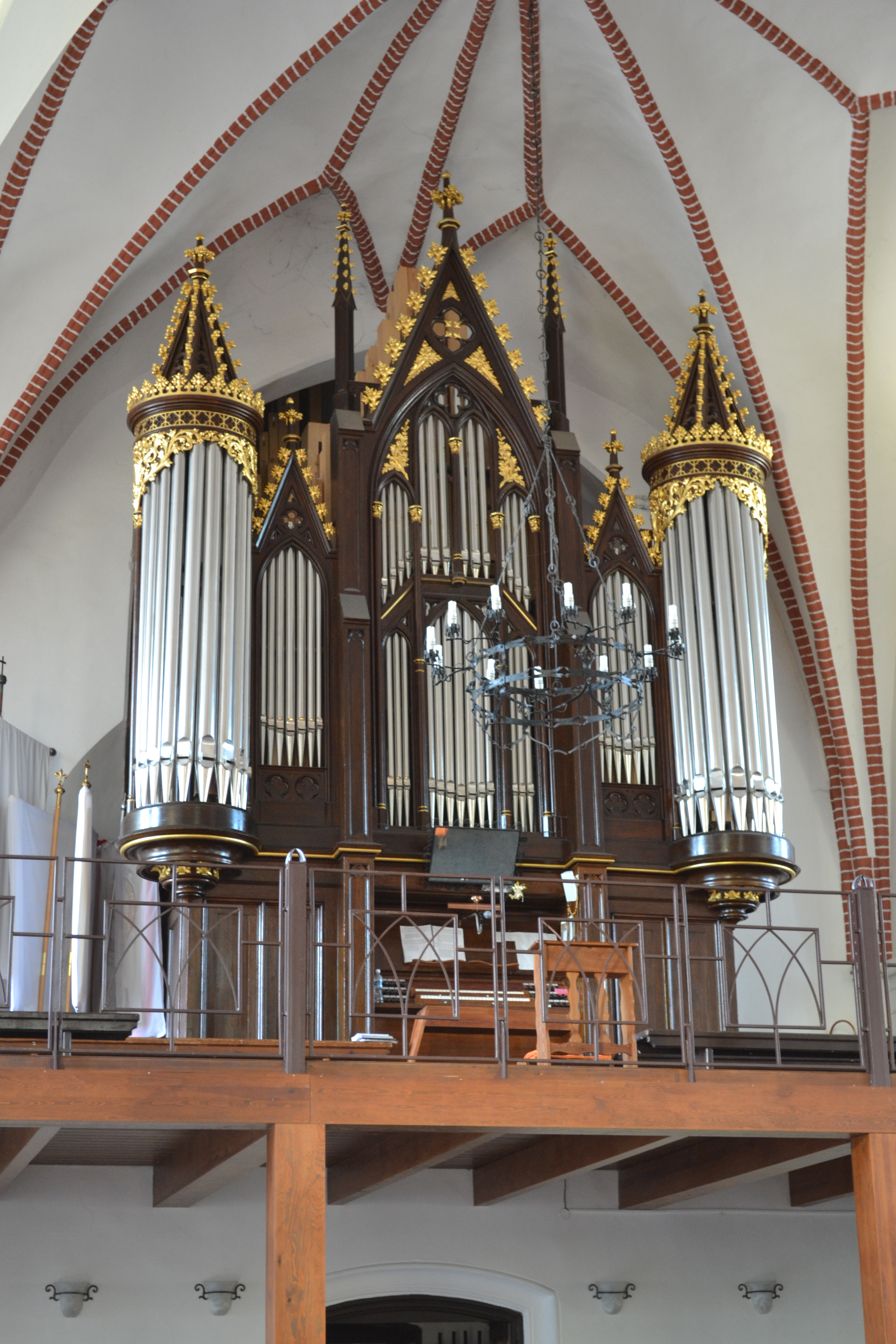 Kościół Narodzenia Najświętszej Maryi Panny w Gryfinie